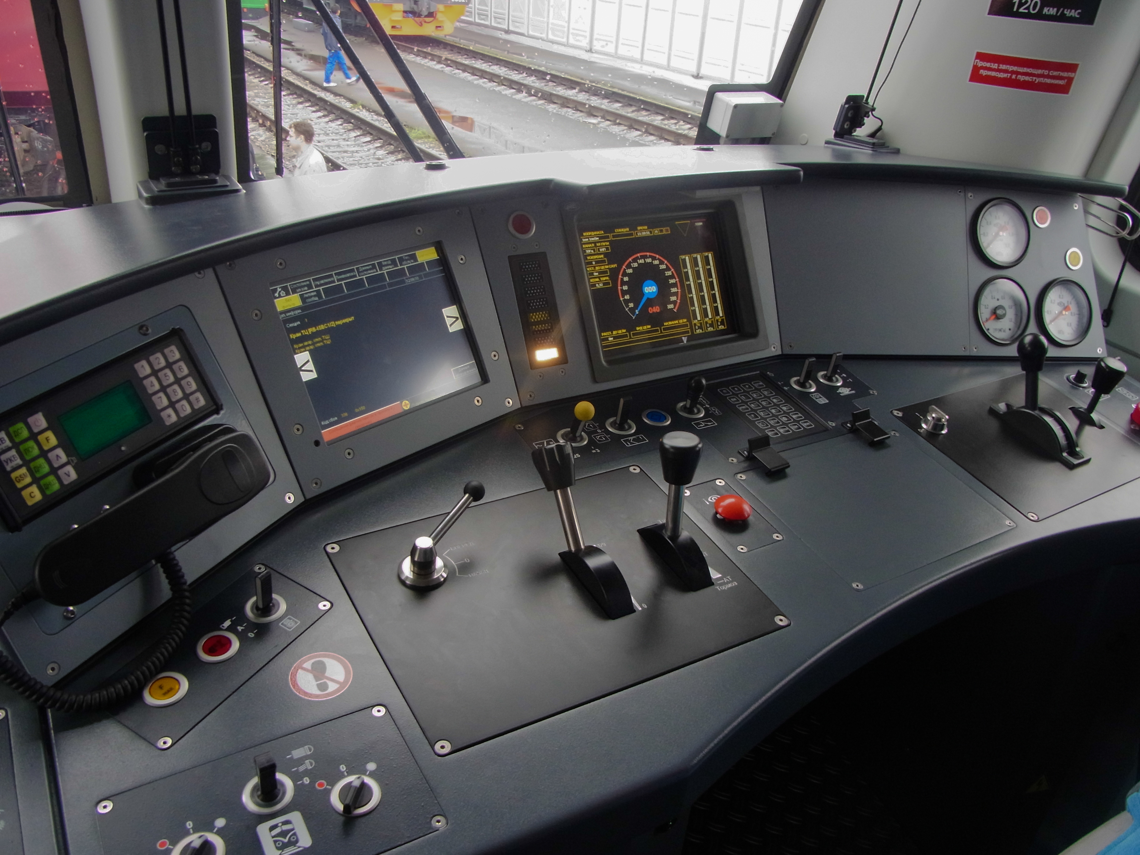 Кабина машиниста секции электровоза 2ЭВ120-001 на выставке ЭКСПО-1520 в Щербинке (территория депо кольца ВНИИЖТ)